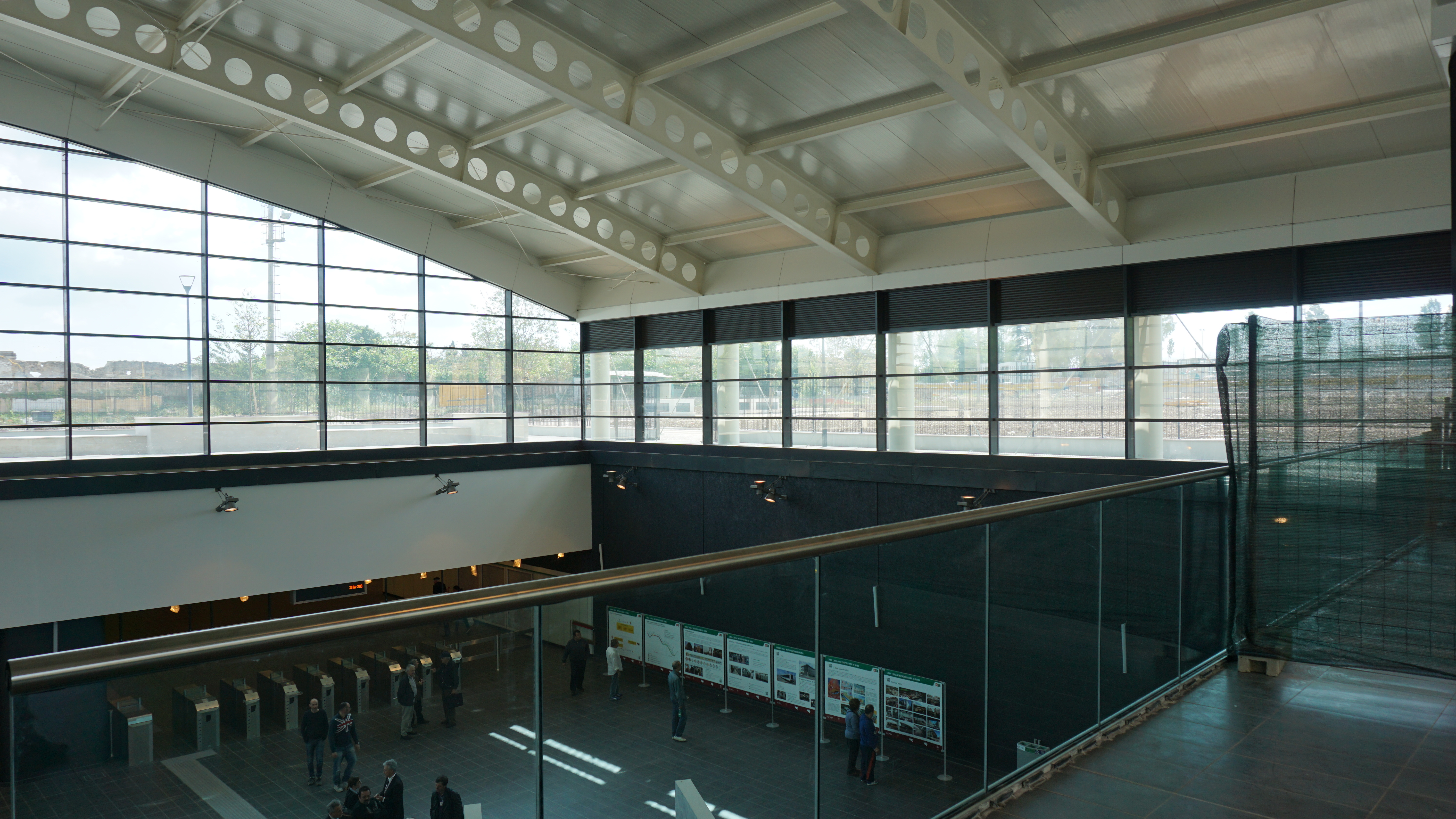 L'atrio della stazione Teano della Metro C di Roma